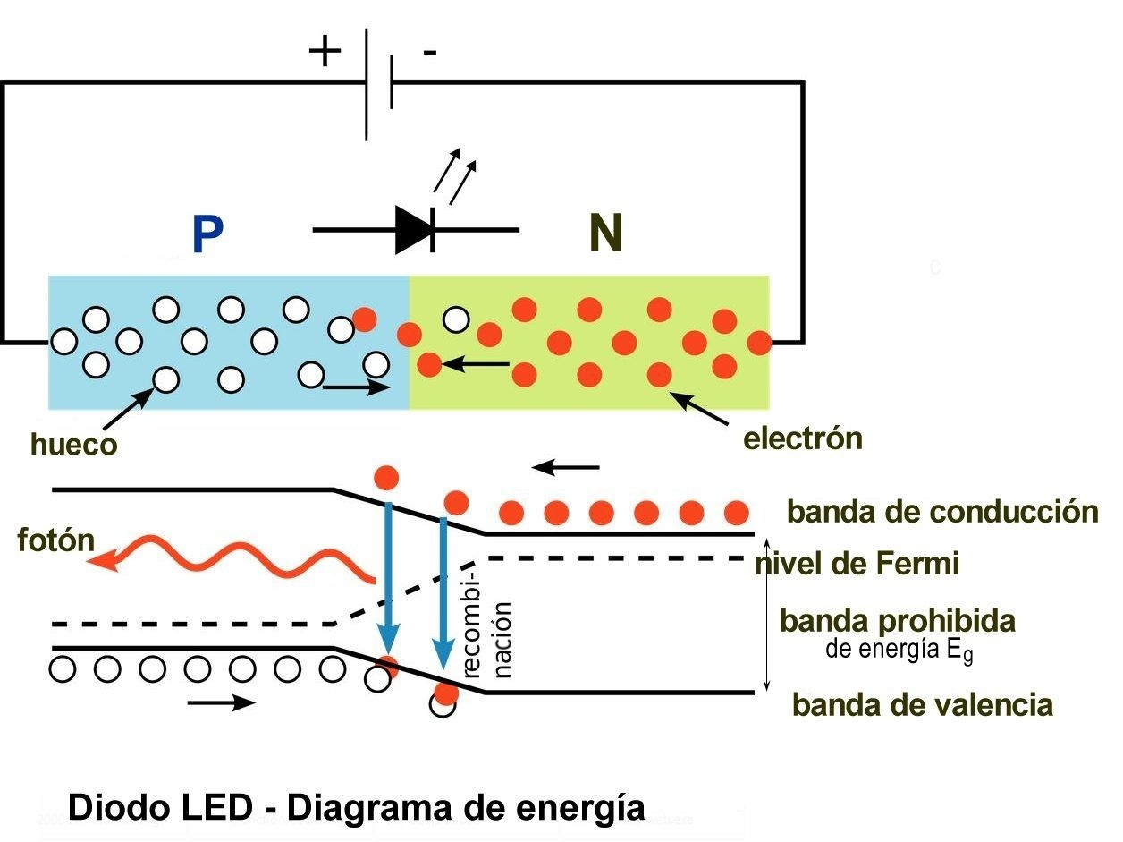 LED, Union PN, Diagrama de Energías. Proyecto de Innovación Docente 2013 de la ETSI de Telecomunicación UPM; coordinador P. Mareca, subido por Alberto Marcos